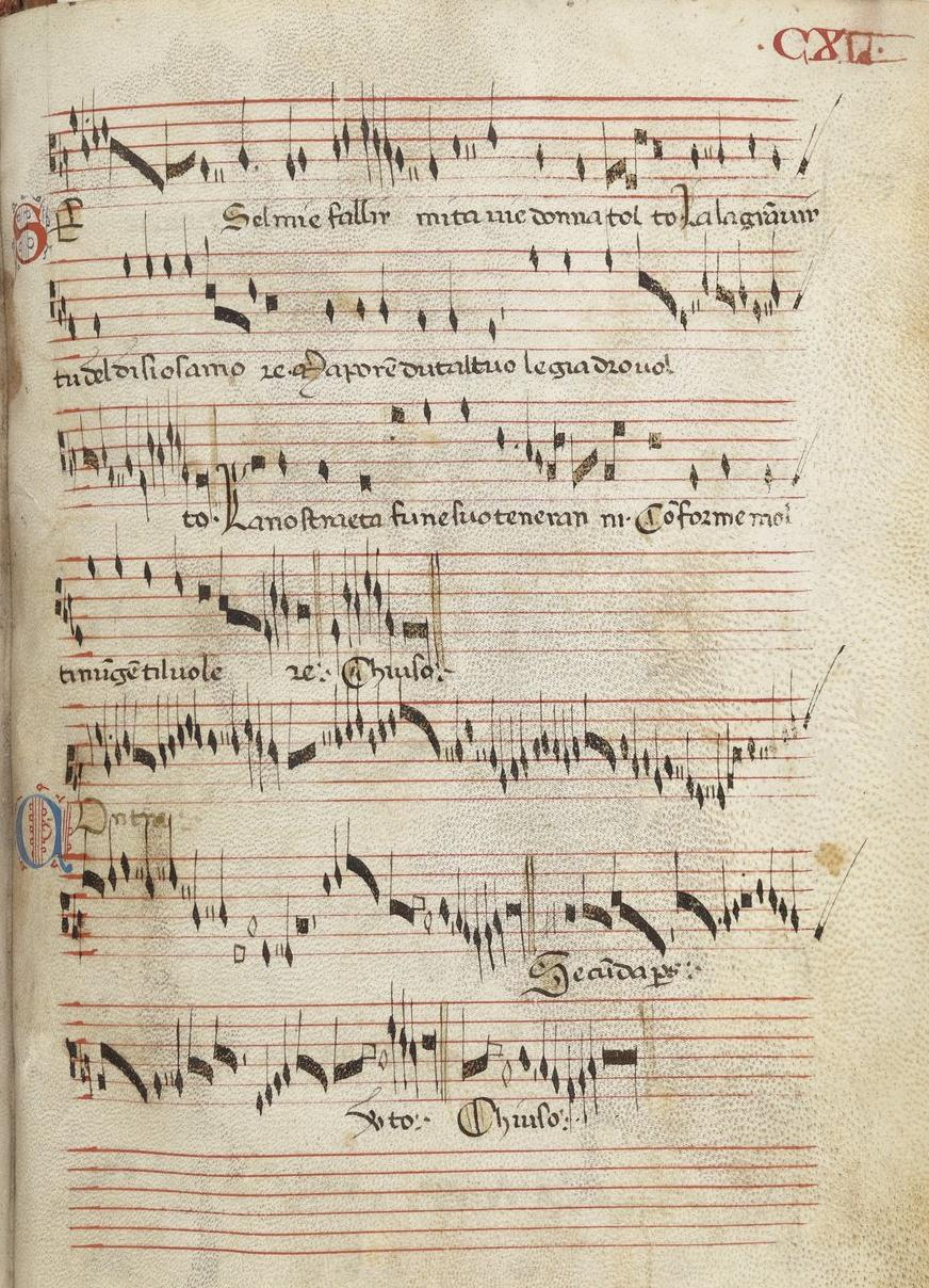 Paris, Bibliothèque Nationale, fonds italien 568